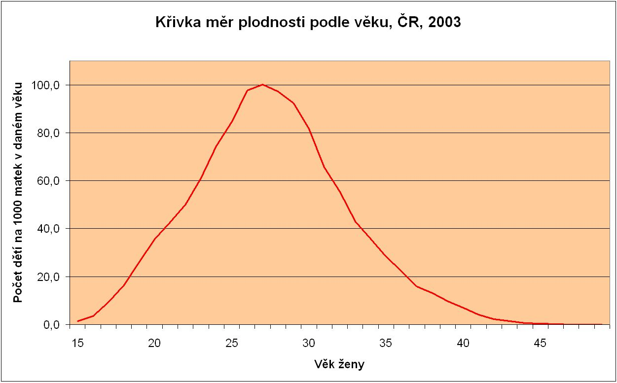 Křivka míry plodnosti podle věku|Mírá plodnosti podle věku|míry plodnosti podle věku v České republice v roce 2003. Křivka udává počet narozených dětí na 1000 matek v jednotlivém věku od 15 do 49 let.